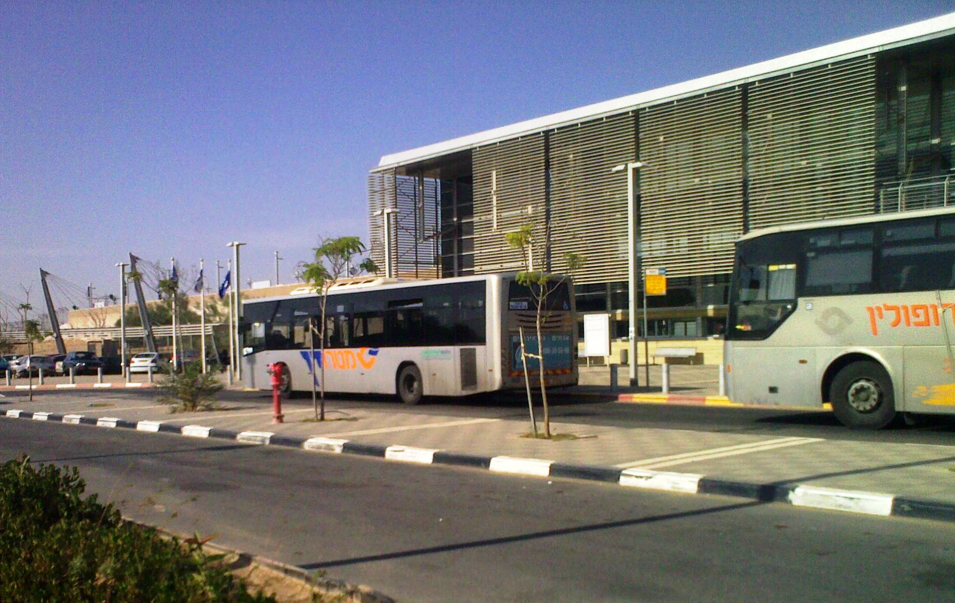 אוטובוסים של מטרופולין ומטרודן בתחנת הרכבת באר שבע צפון